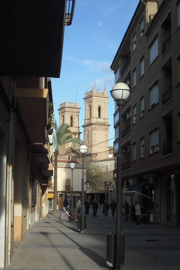 Iglesia de Almácera desde el carrer de València